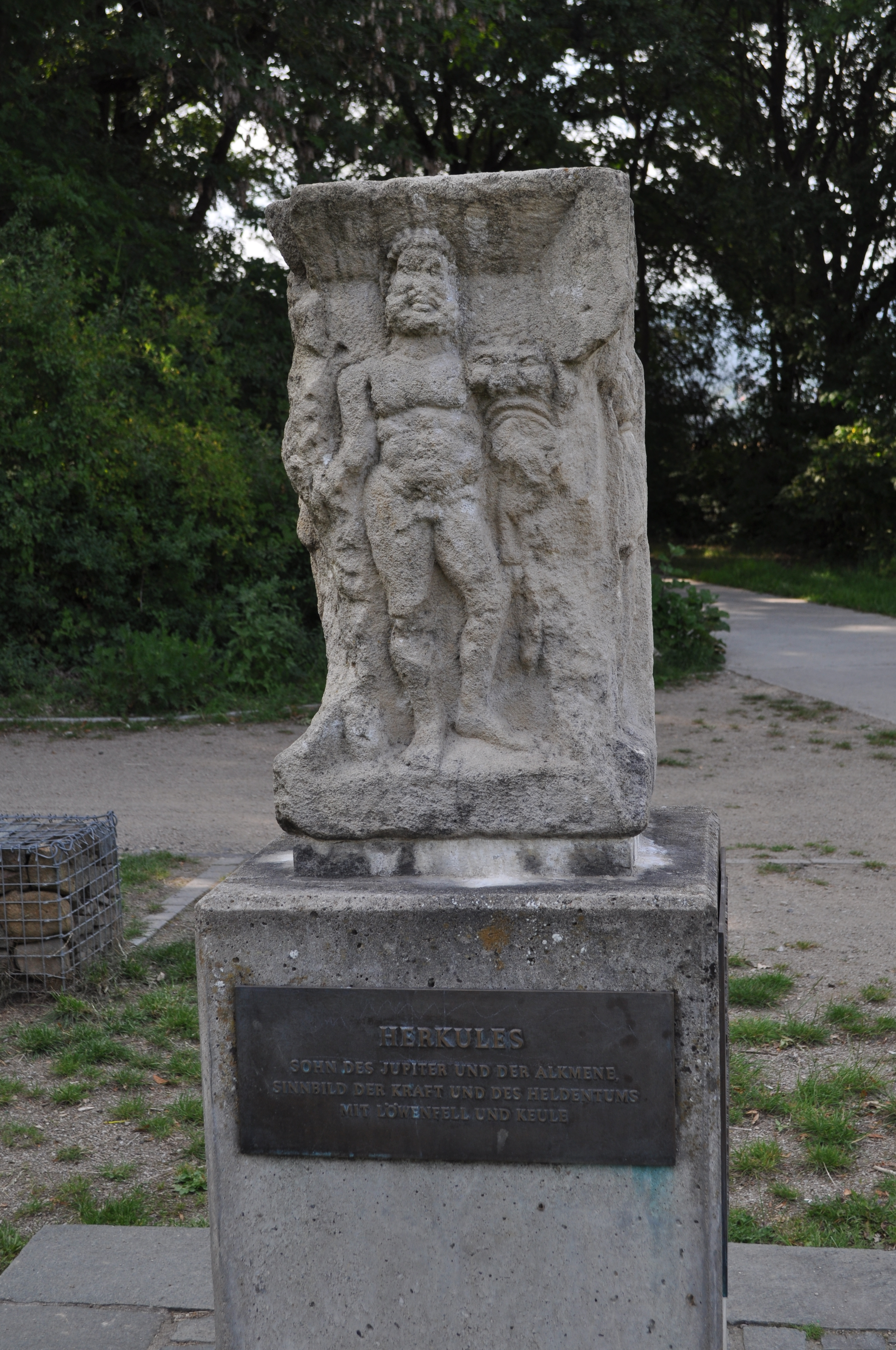 Darstellung der Herkules auf dem Viergötterstein in Schwalbach